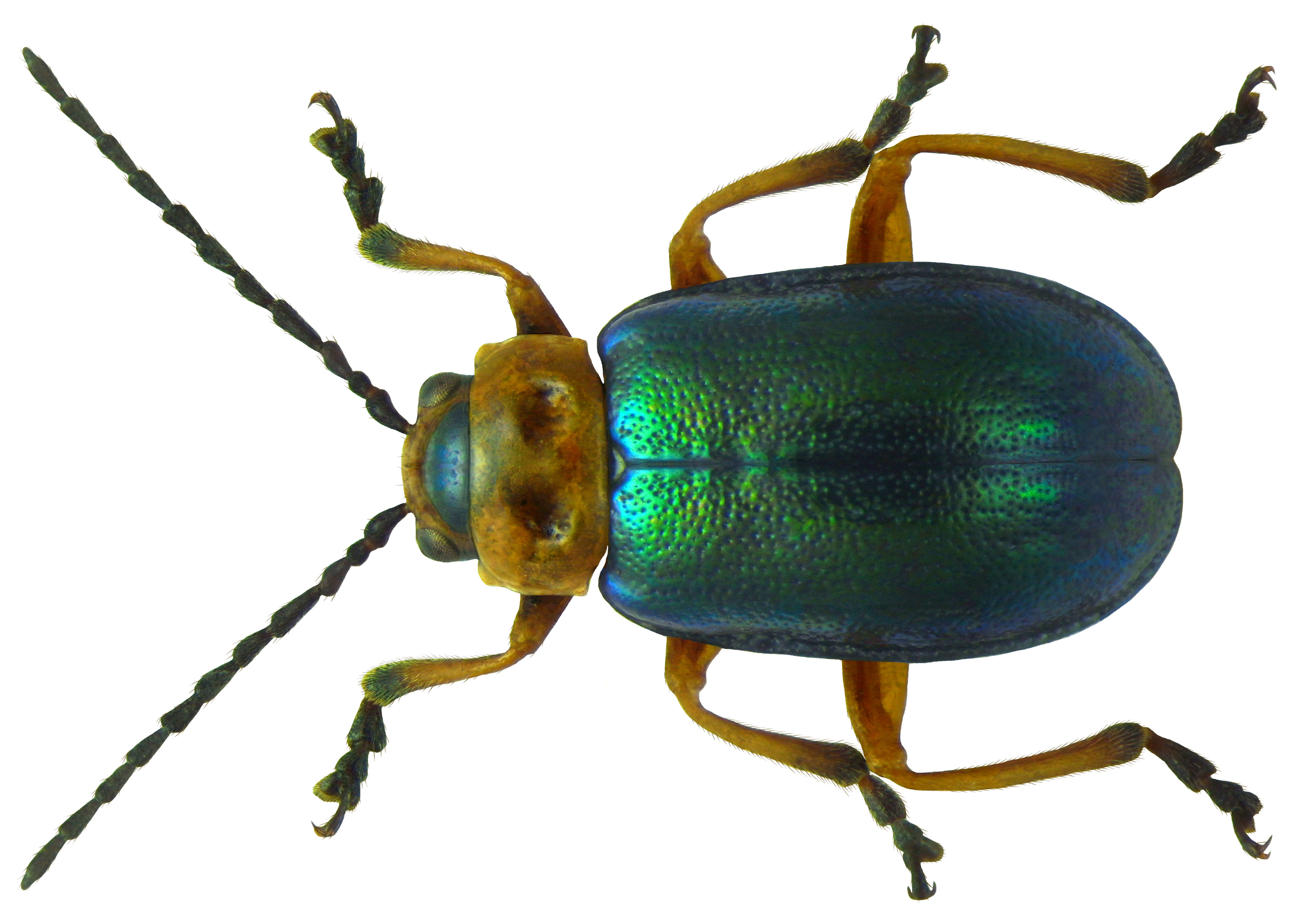 Sermylassa halensis (Linné, 1767) Familie: Chrysomelidae Groesse: 5-7 mm Verbreitung: südliches Nordeuropa bis Südeuropa Oekologie: an Galium-Arten Fundort: Germania, Bayern, Oberfranken, Kulmbach leg.det. U.Schmidt, 1973 Photo: U.Schmidt, 2011